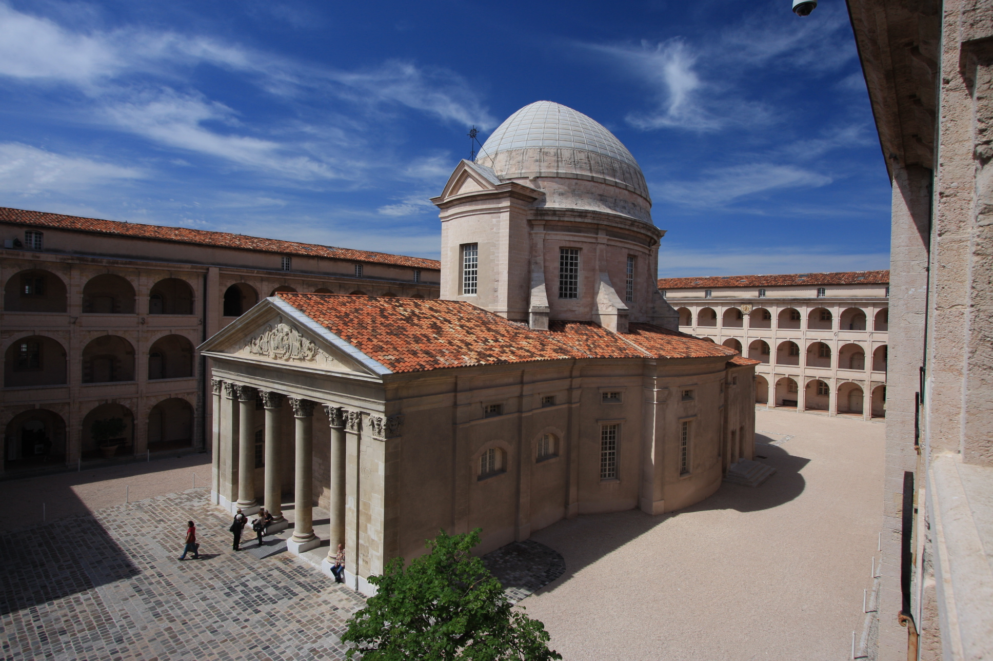 La Vieille Charité, dans le quartier du Panier à Marseille